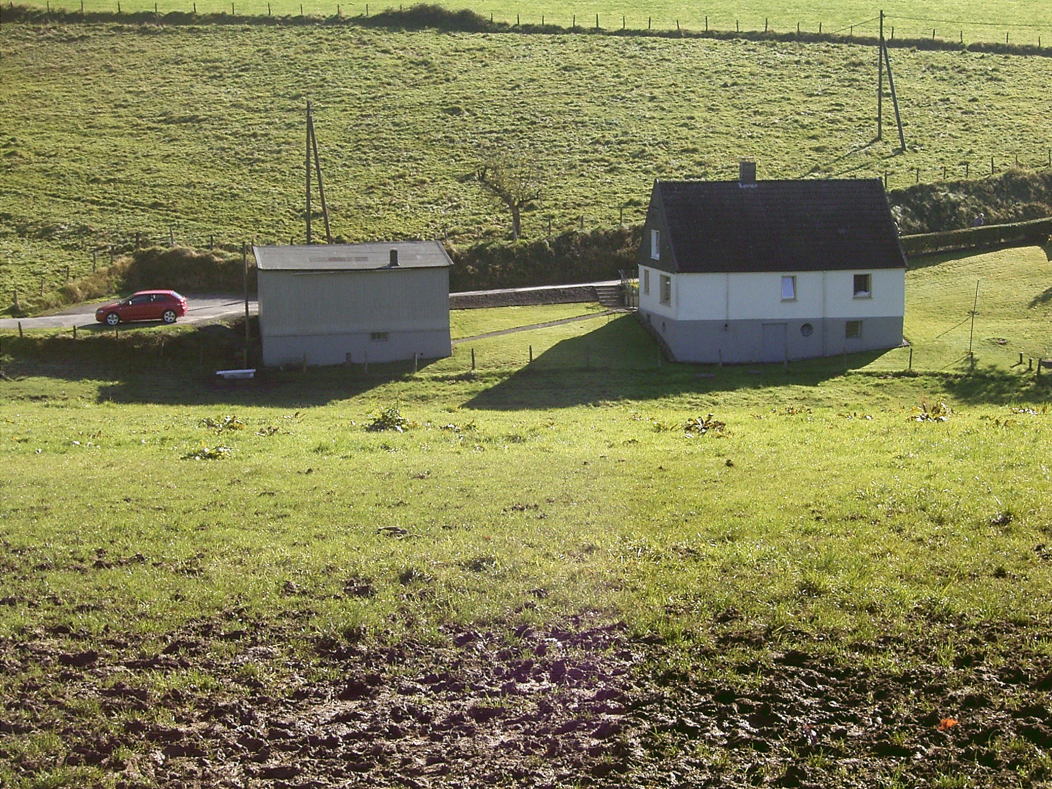 Radevormwald